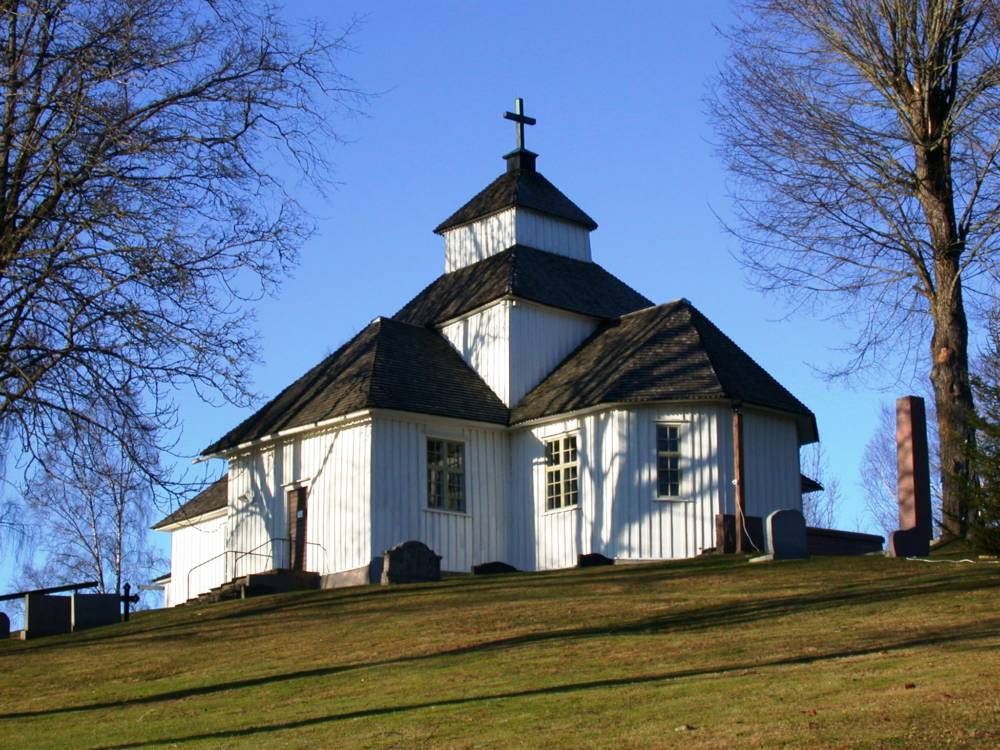 Vättak church, Tidaholm, Sweden